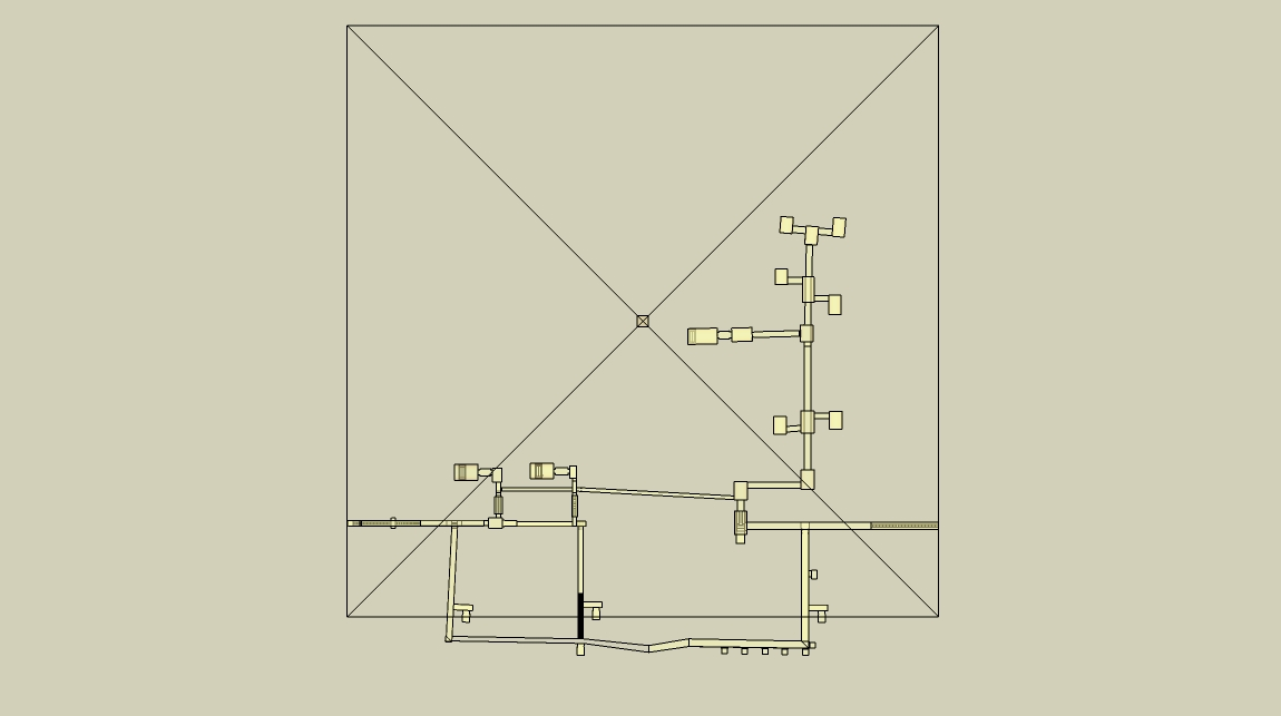 restitution du complexe funéraire d'amenemhat III à Dahchour, appartements funéraires